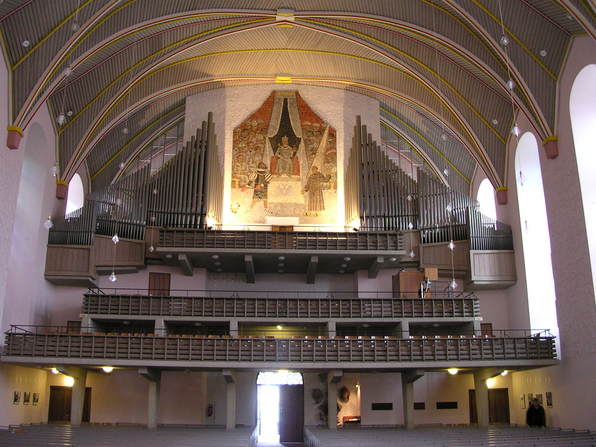 Worms, Orgel der Dreifaltigkeitskirche, Mosaik “Luther vor Kaiser Karl V.”